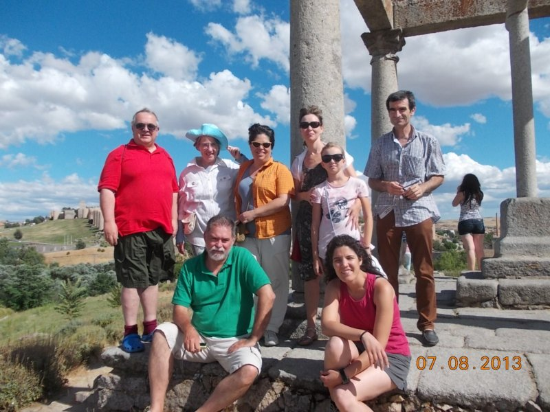 grupo en avilo